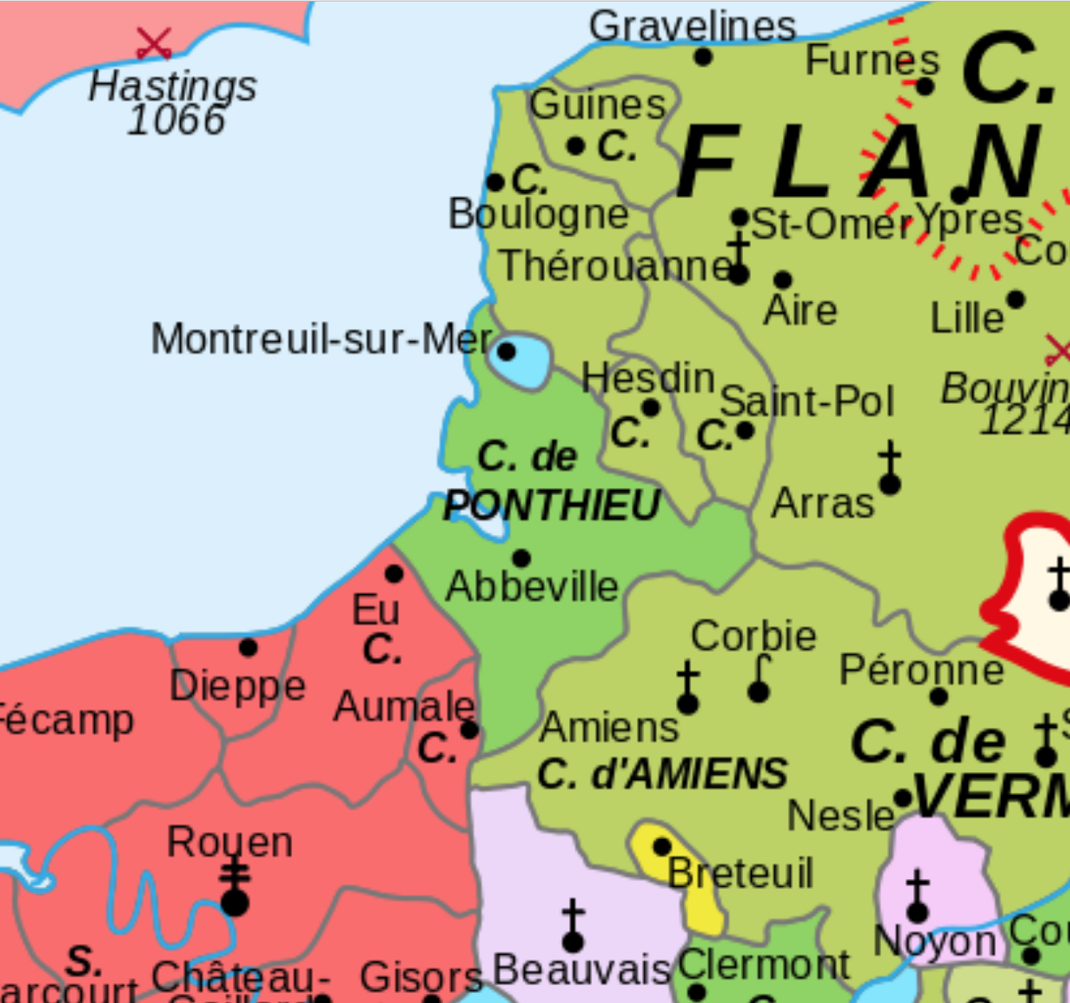 Carte du Comté de Ponthieu et de ces alentours en 1180